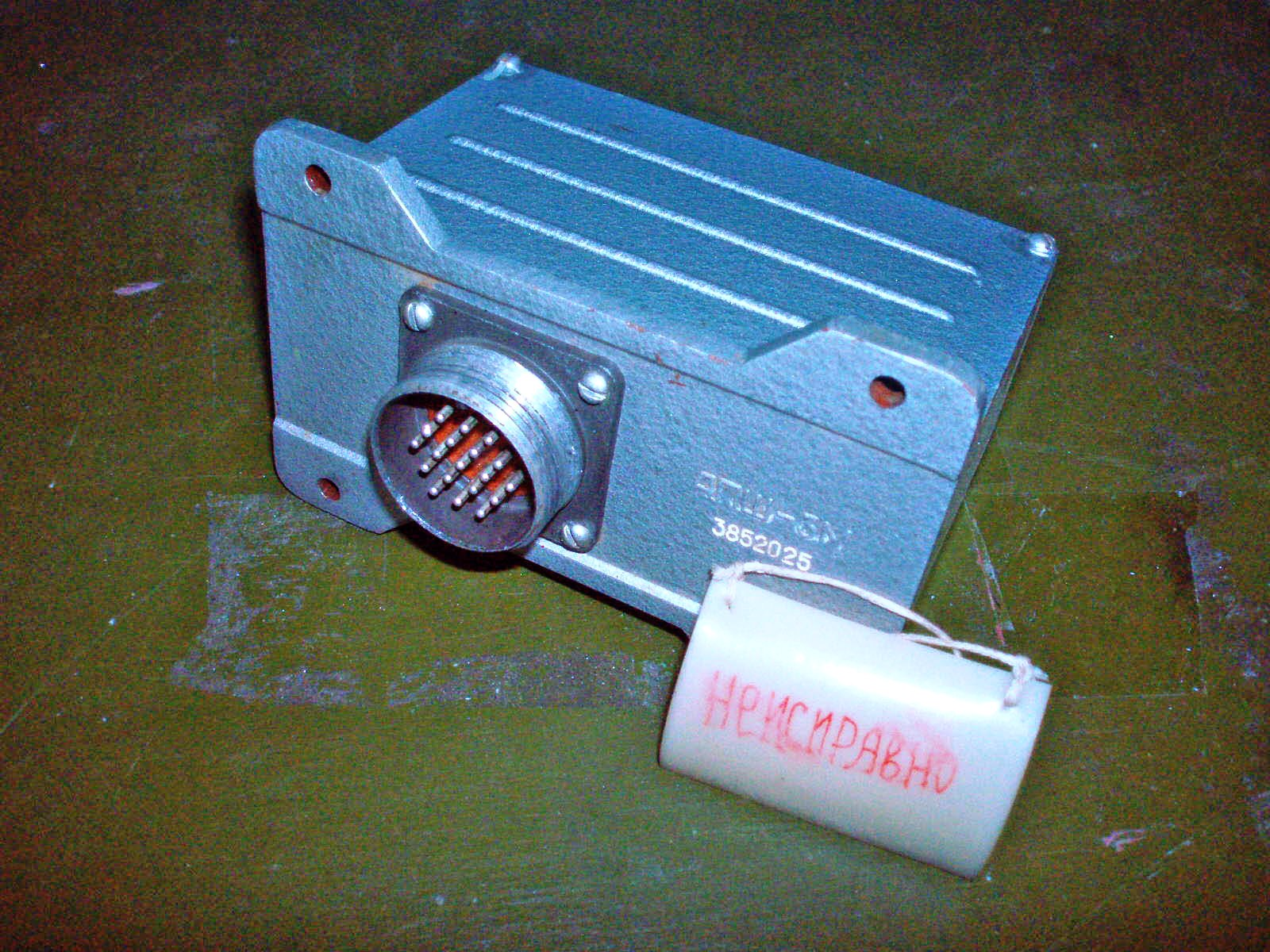 Автомат переключения шин